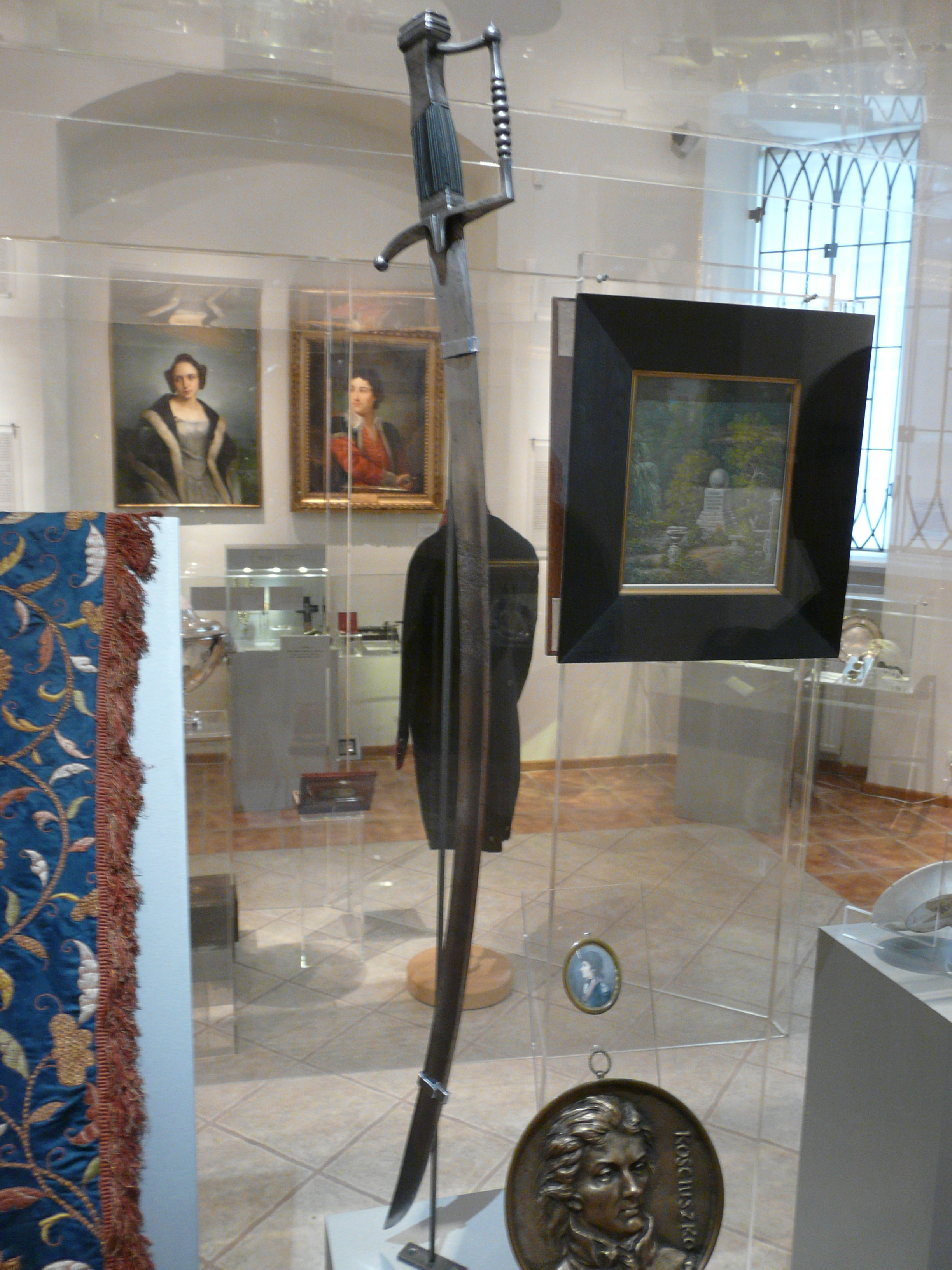 Szabla Tadeusza Kościuszki. Francja, koniec XVIII w., stal, żelazo, heban